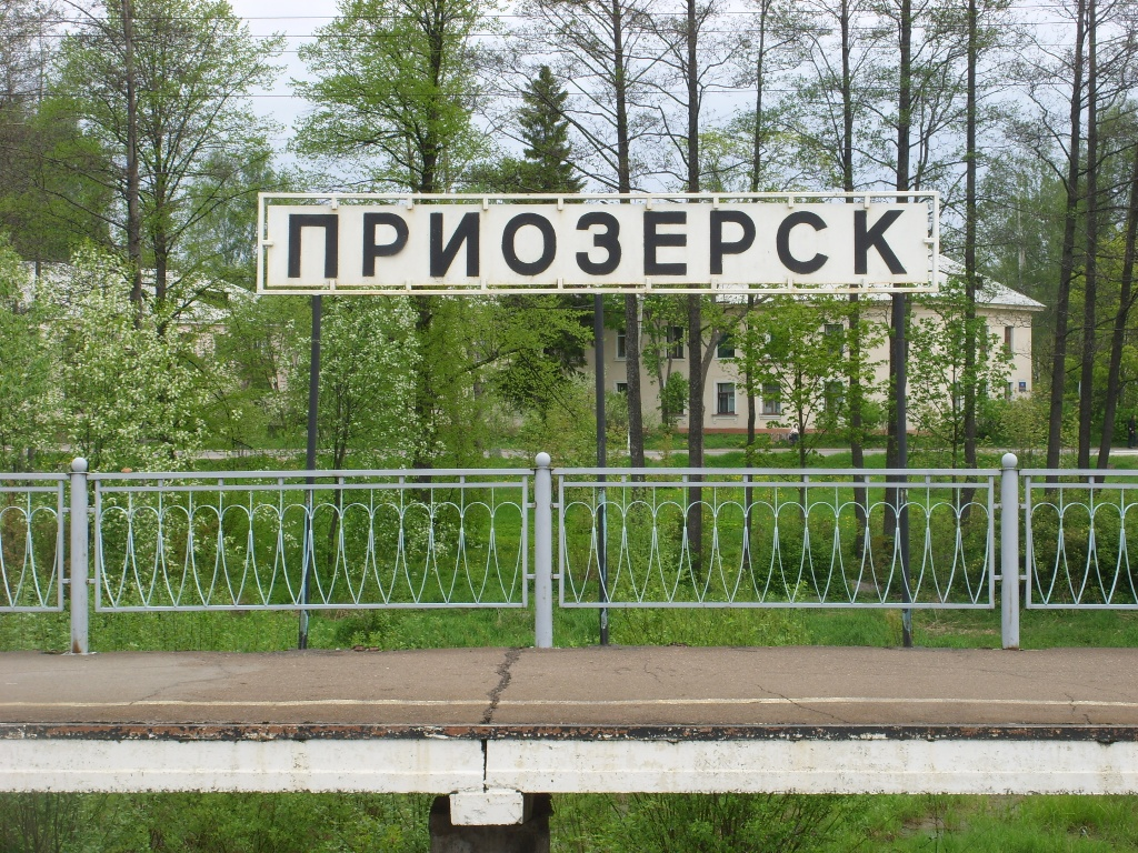 Ст. Приозерск, указатель с названием станции